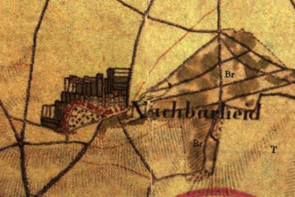 Kartenaufnahme der Rheinlande 1804/05